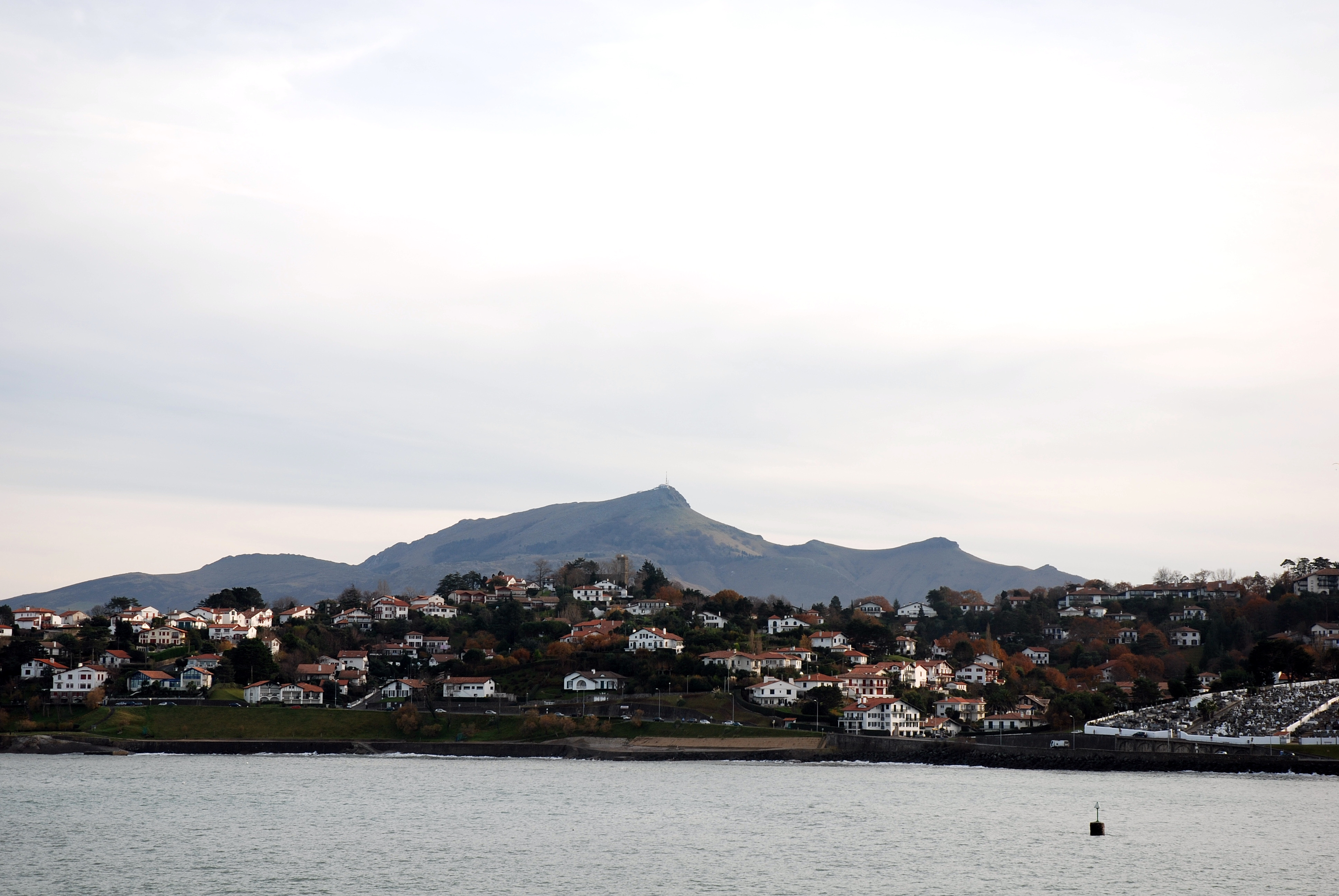 Ciboure, surplombée par la Rhune. Photo prise le 03/01/07 par Harrieta171